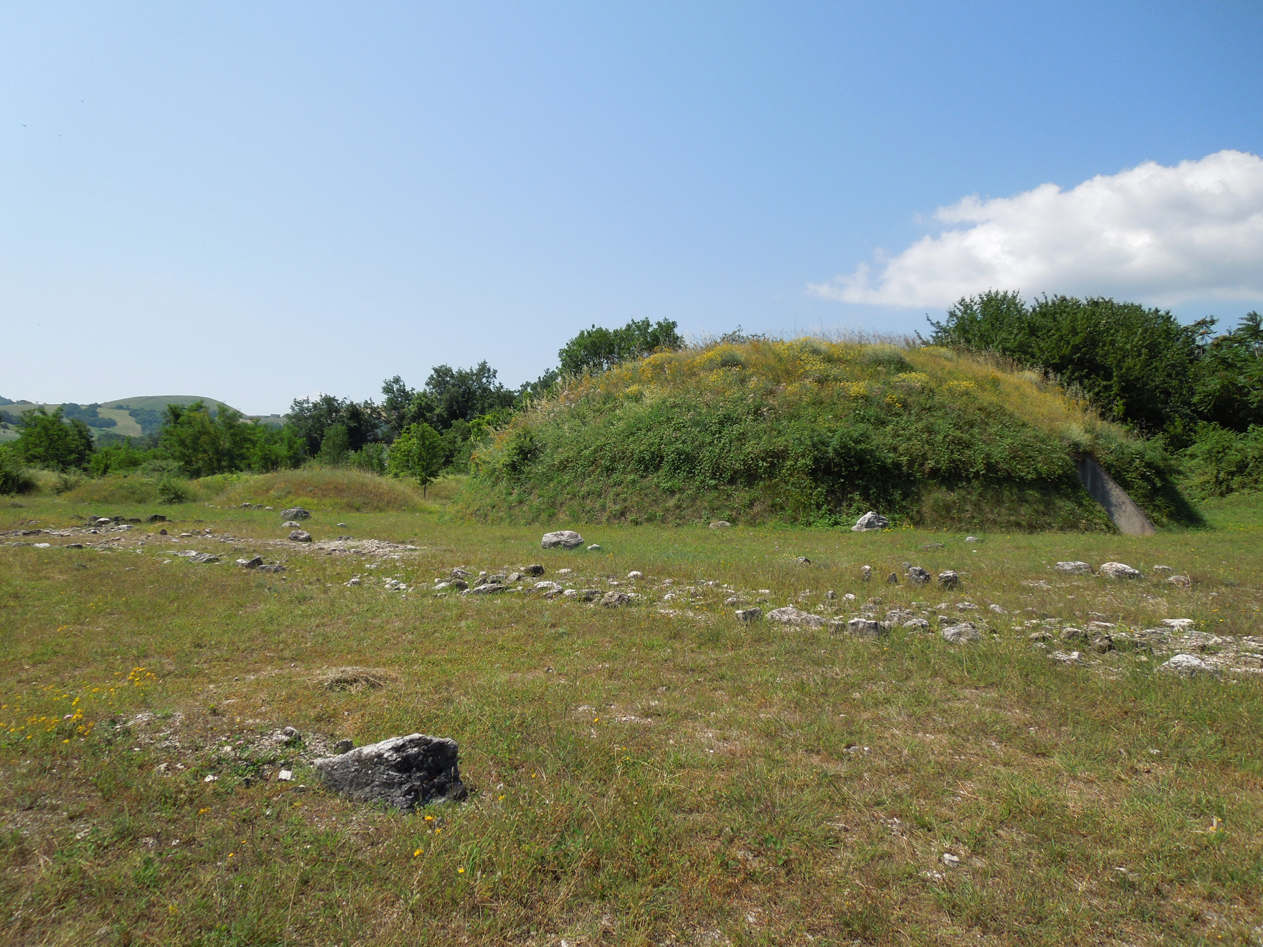 Ricostruzione di un tumulo della Necropoli di Campovalano in provincia di Teramo. All'interno si trovano una sala polifunzionale e la ricostruzione di una camera sepolcrale. Un sentito ringraziamento al Funzionario Maria Di Gennaro della Soprintendenza A.B.A.P d'Abruzzo.